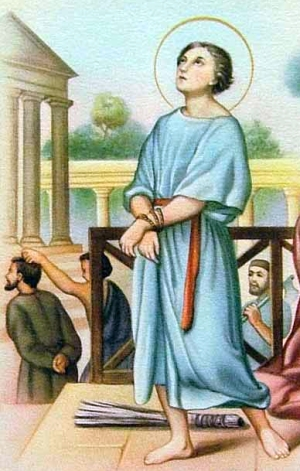 Saint Emilius